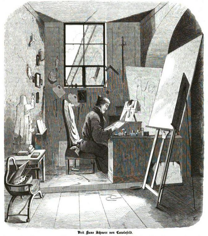 A.v. B.: Veit Vans Schnorr von Carolsfeld, in Sachsengrün, Culturgeschichtliche Zeitschrift aus sämmtlichen Landen sächsischen Stammes, Verlag Woldemar Turk, Dresden, Nr. 1 vom 1. Oktober 1861, S. 5-7 Digitalisat